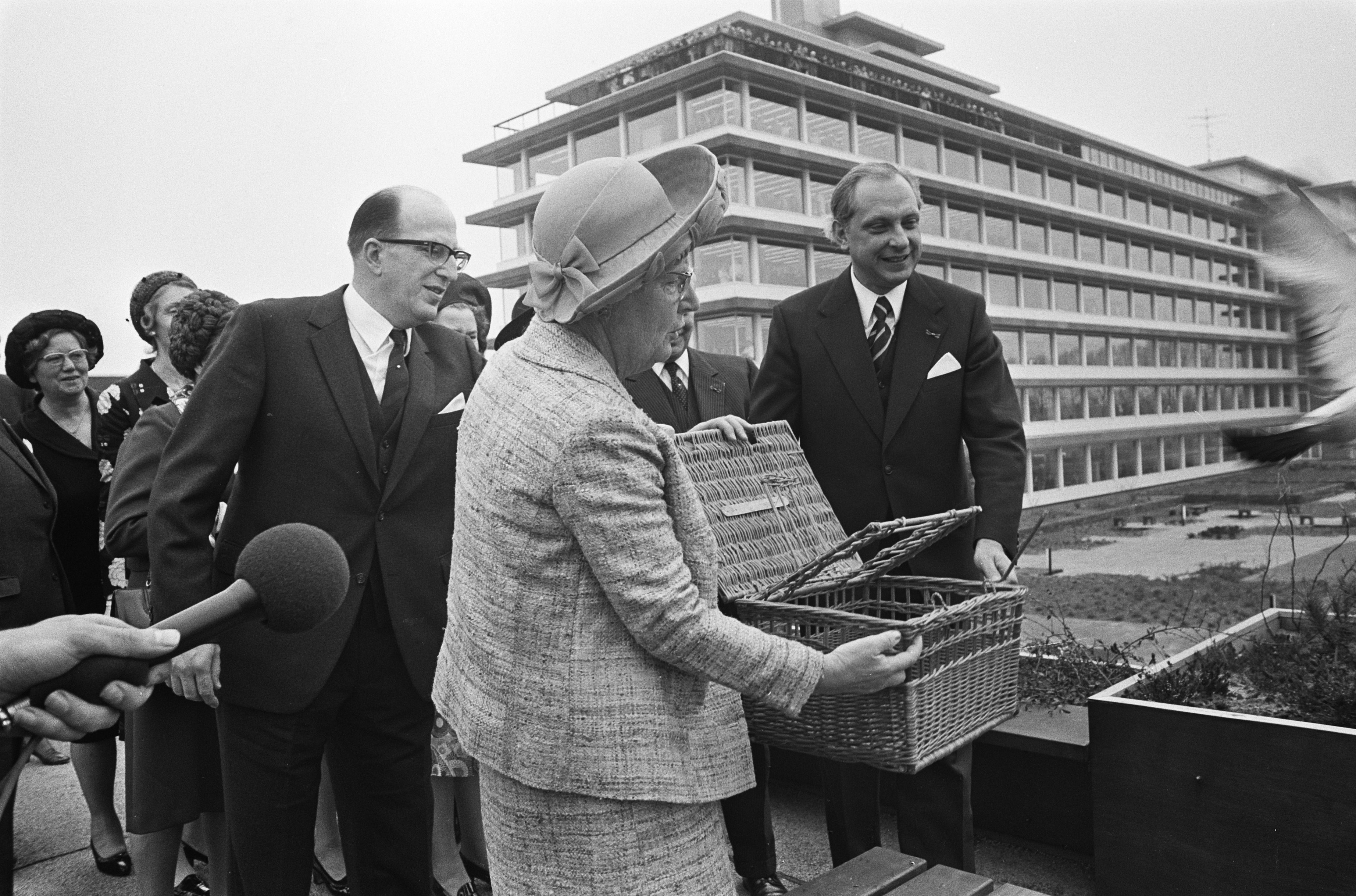 Collectie / Archief : Fotocollectie Anefo Reportage / Serie : Hare Majesteit opent het provinciehuis in Zwolle Beschrijving : koningin Juliana opent provinciehuis in Zwolle, koningin Juliana laat postduif los met Jan Niers (Commissaris van de koningin) Datum : 3 mei 1973 Locatie : Overijssel, Zwolle Trefwoorden : commissarissen van de koningin, koninginnen, openingen, provinciehuizen Persoonsnaam : Juliana (koningin Nederland), Juliana (koningin Nederland), Niers, J.L.M. Fotograaf : Hans Peters / Anefo Auteursrechthebbende : Nationaal Archief Materiaalsoort : Negatief (zwart/wit) Nummer archiefinventaris : bekijk toegang 2.24.01.05 Bestanddeelnummer : 926-3852